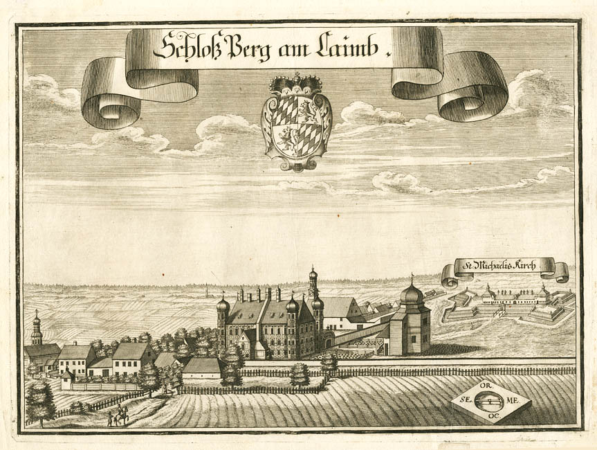 “Schloß Pergam Laimb – “St: Michaelis Kirch.” aus : Beschreibung des Churfürsten- u. Hertzogthumbs Ober- und Nidern Bayrn. Rentamt München, 1701